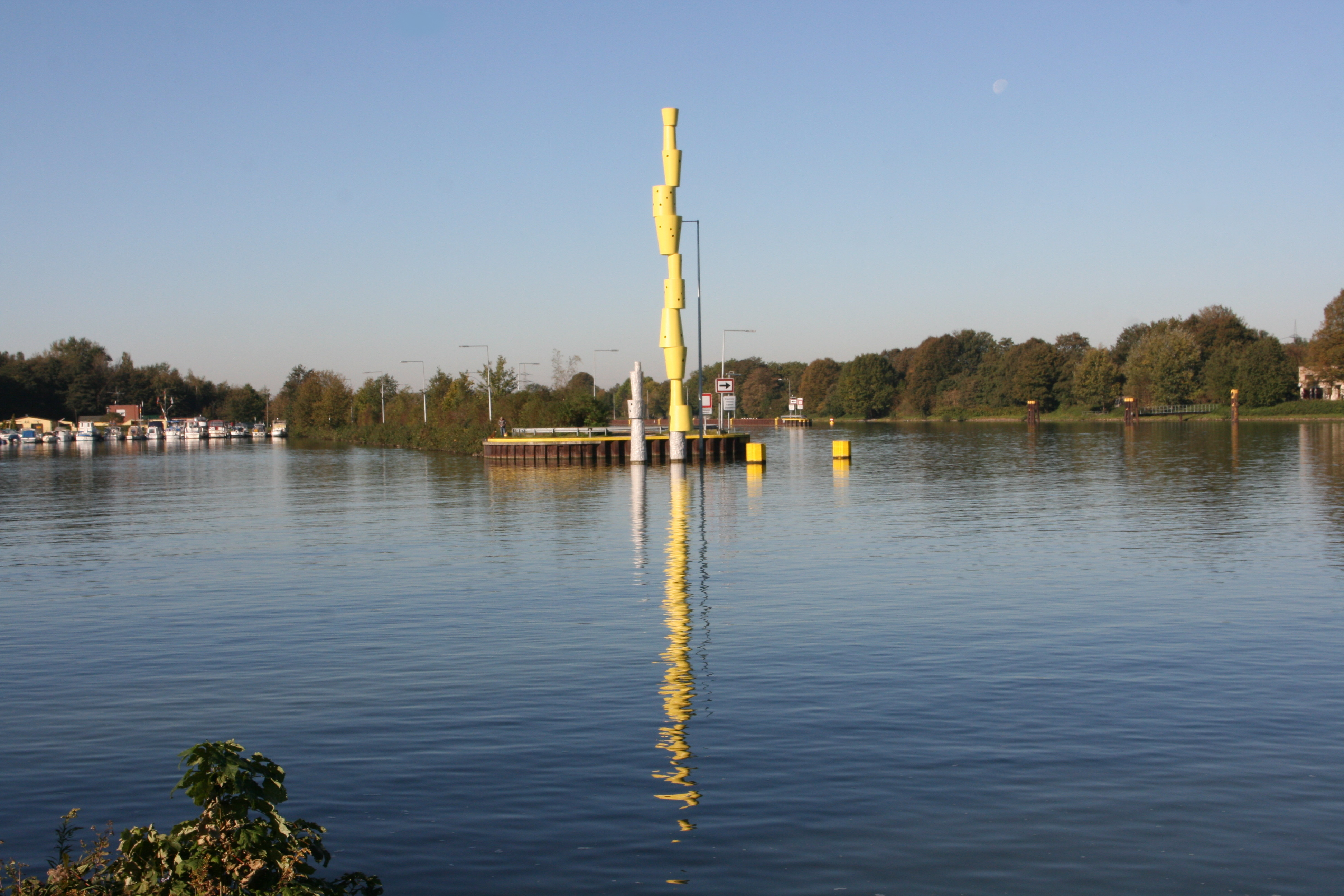 Blick vom Hafen Friedrich auf Reemrenreh am Rhein-Herne-Kanal in Herne